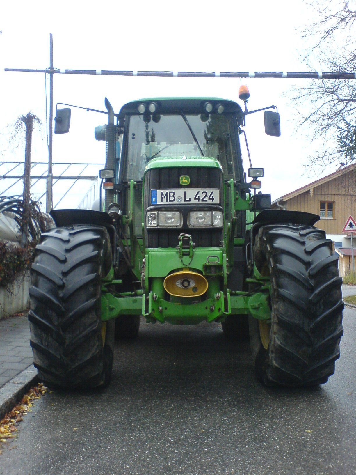 Schlepper John Deere 6920S, Frontansicht.